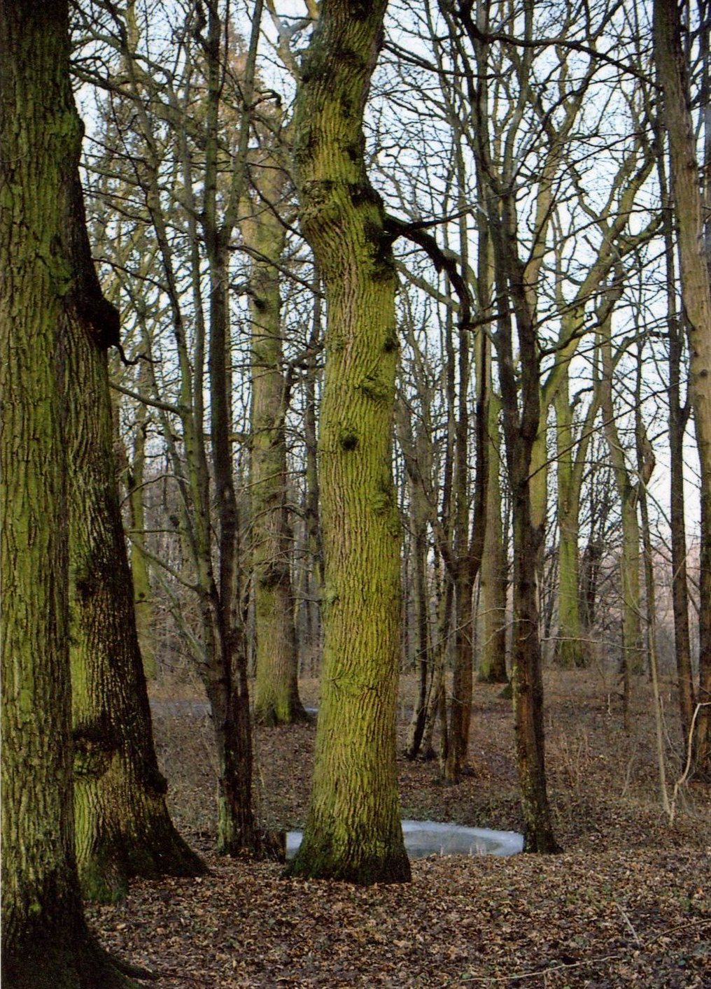 Autor: Adrian Grzegorz Rok wykonania: 2001